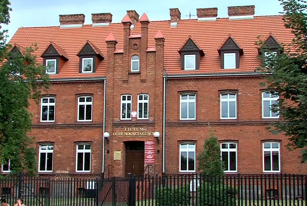 Liceum Ogólnokształcące w Pelplinie